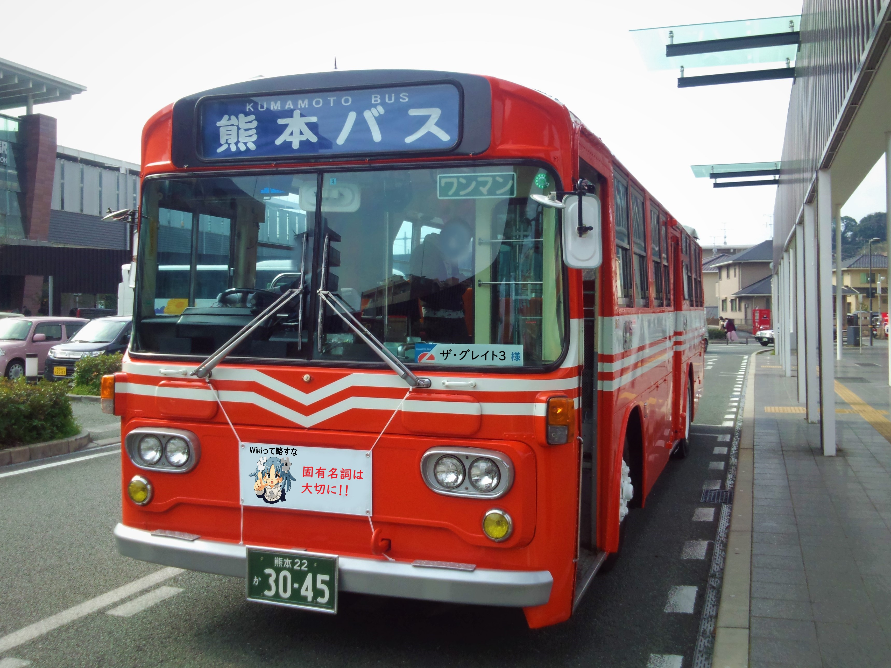 元熊本市交通局、熊本バスに譲渡後2018年現在も現役の三菱K-MP118K（※熊本バス_熊本22か3045-02.jpgの横断幕差し替え版）。